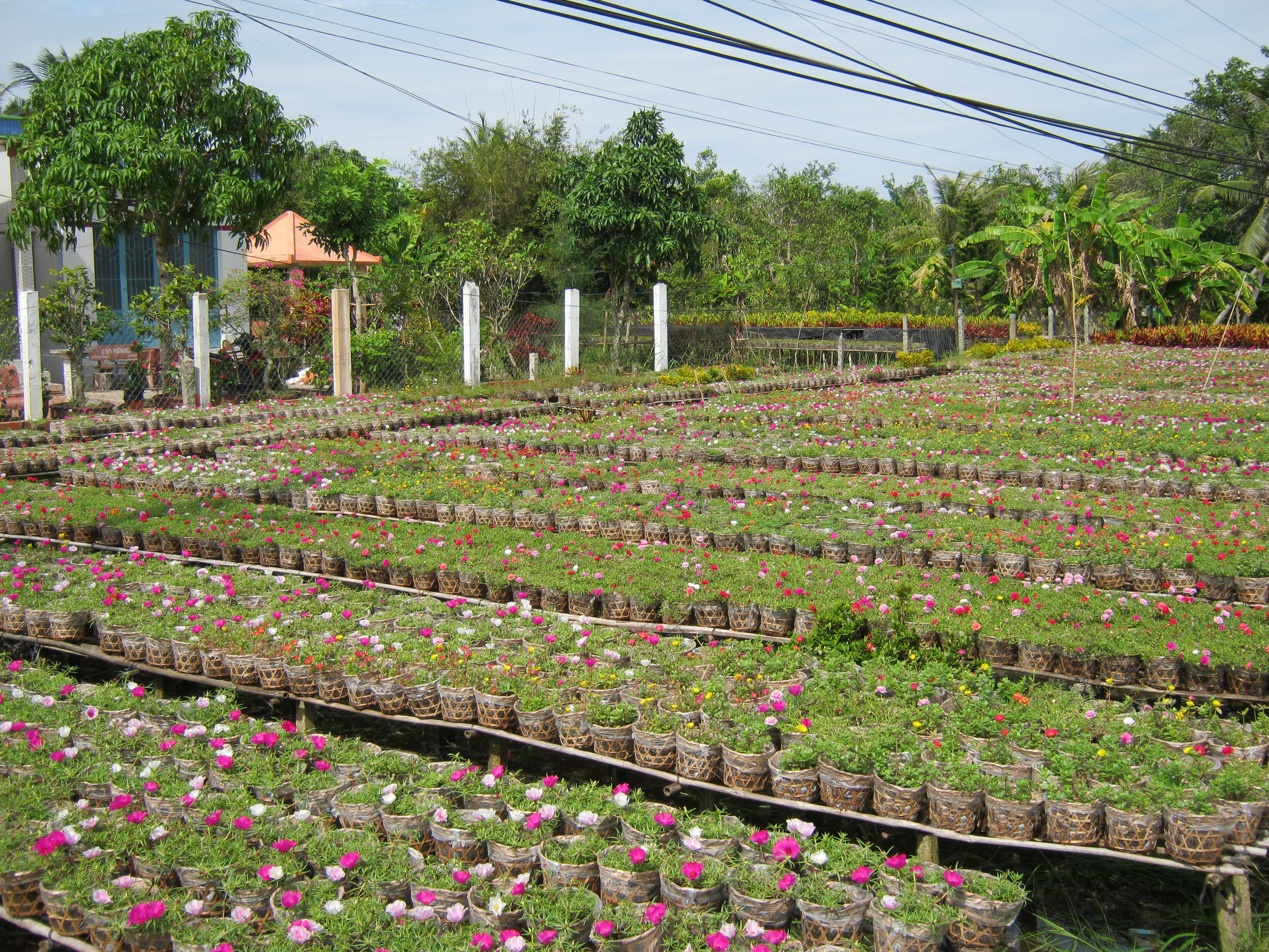 Một vườn hoa tại Tân Quy Đông, thị xã Sa Đéc (Việt Nam).